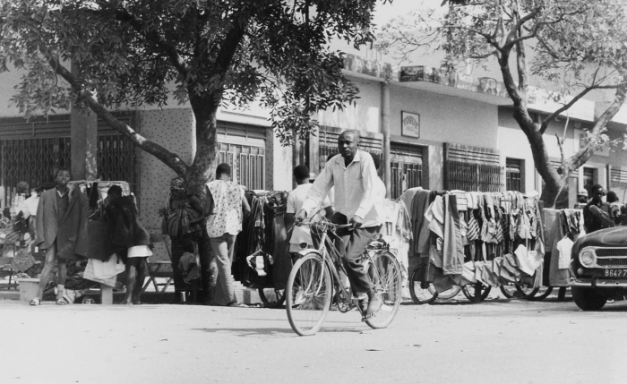 De opname is gemaakt tijdens één van de twee verzamelexpedities die het Tropenmuseum in 1970-1971 ondernam ter voorbereiding op de grote tentoonstelling in 1971-1972, getiteld 'Samo. Een Afrikaans Savannevolk in ontwikkeling'. De expedities duurden elk drie maanden en werden uitgevoerd door de heren J.T. Broekhuijse en F.M. Cowan.